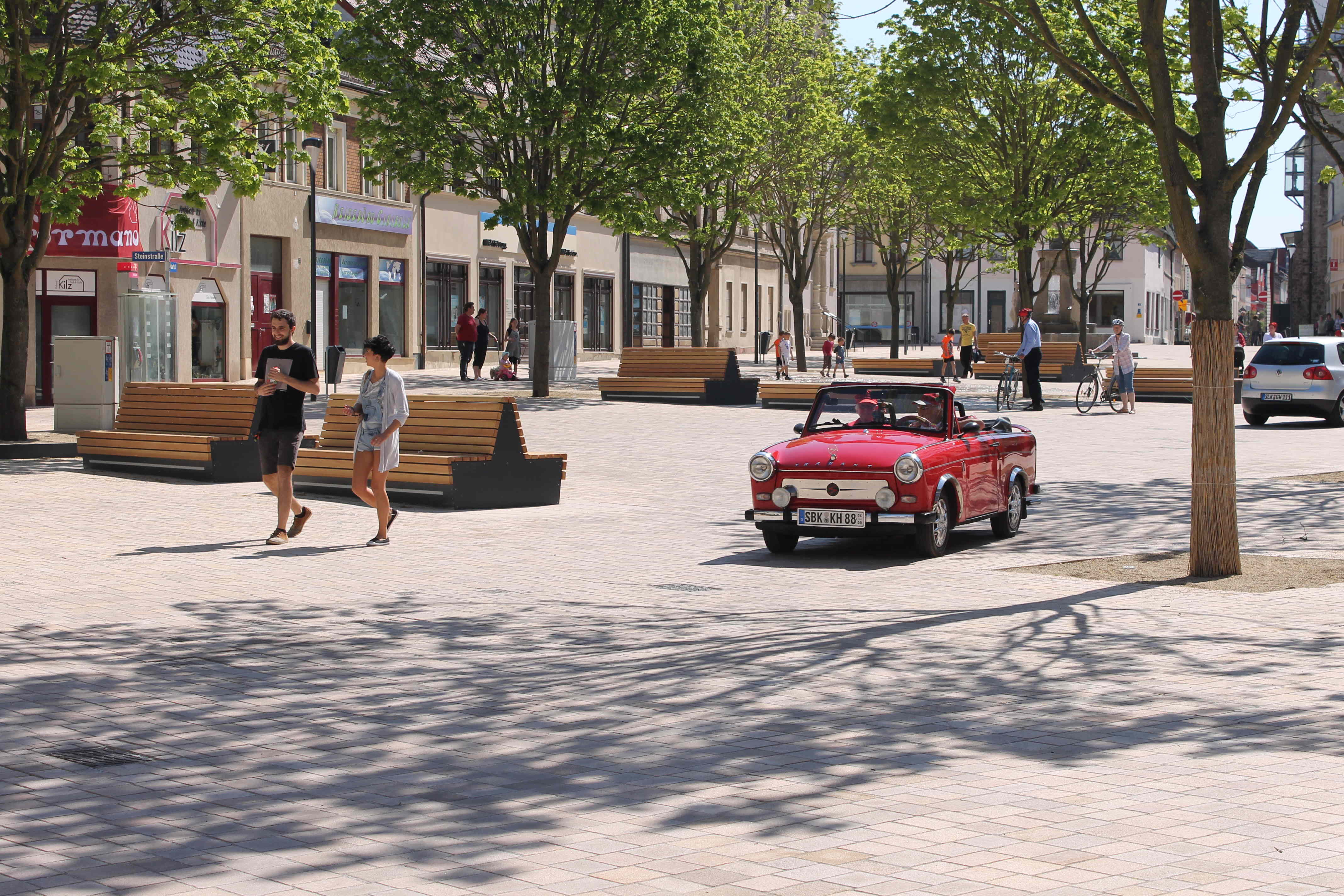 Marktplatz Schönebeck (Elbe) - Altstadt